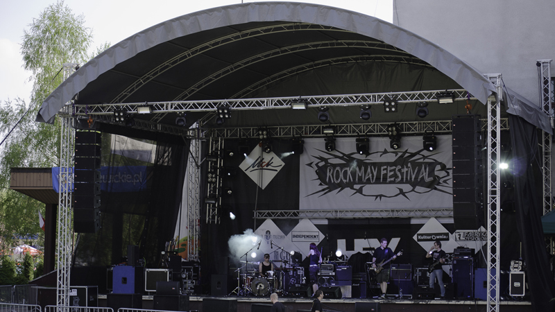 scena Rock Maz Festval 2012